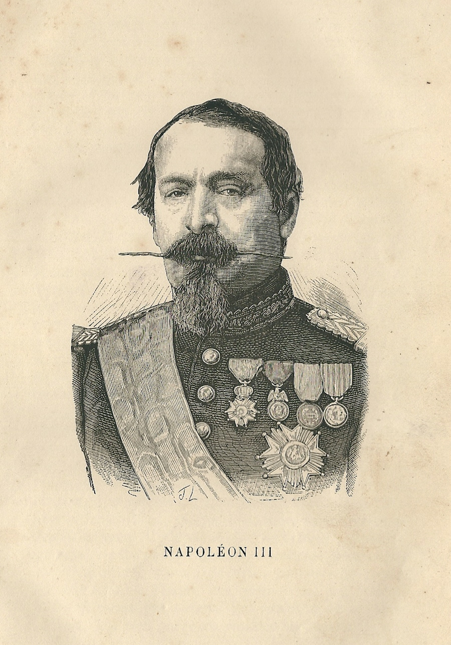 Napoléon III